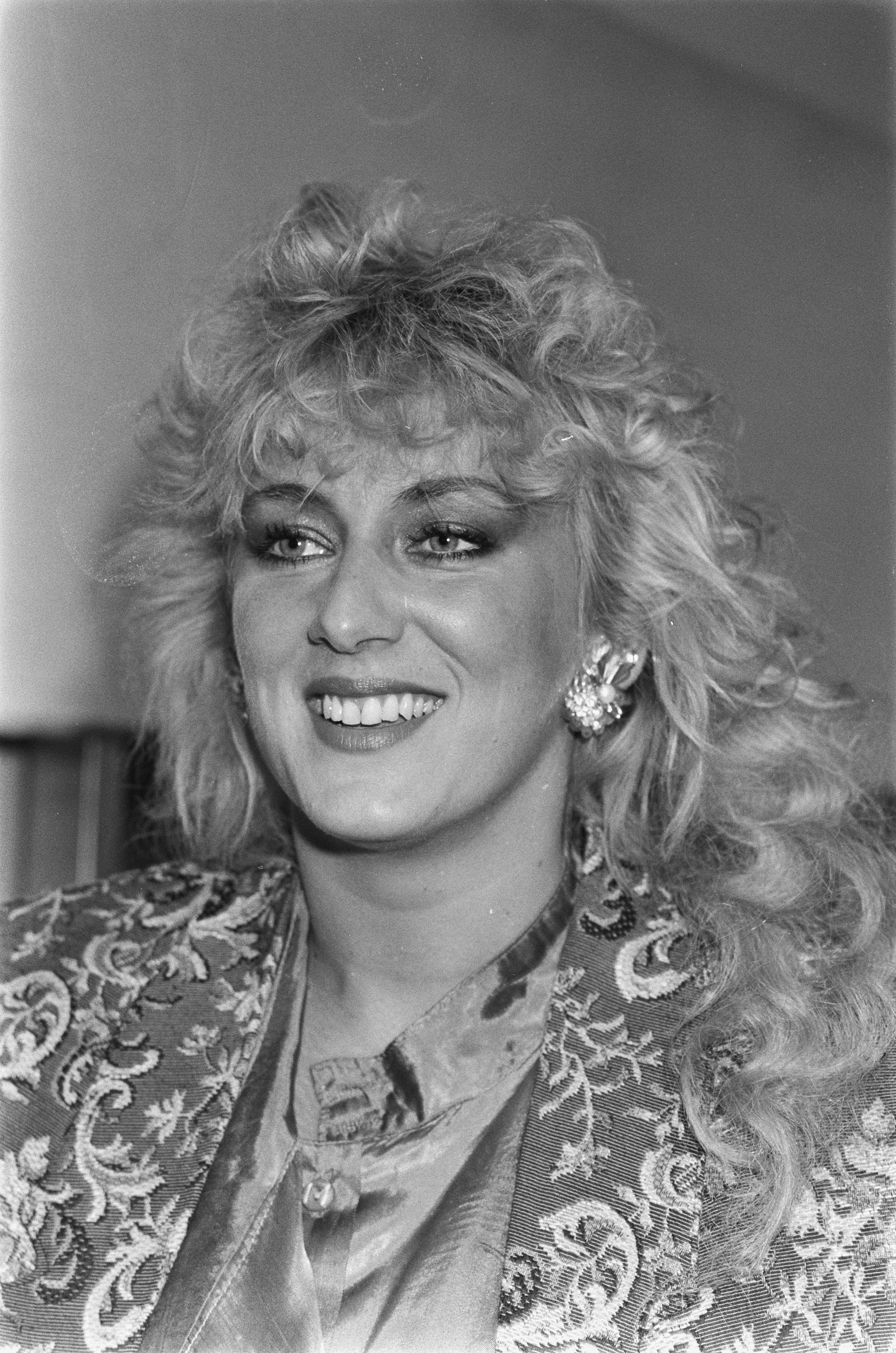 Collectie / Archief : Fotocollectie Anefo Reportage / Serie : [ onbekend ] Beschrijving : Karin Bloemen (kleinkunstenares) op VARA-persconferentie Datum : 22 september 1986 Trefwoorden : portretten Persoonsnaam : Bloemen, Karin Instellingsnaam : VARA Fotograaf : Croes, Rob C. / Anefo Auteursrechthebbende : Nationaal Archief Materiaalsoort : Negatief (zwart/wit) Nummer archiefinventaris : bekijk toegang 2.24.01.05 Bestanddeelnummer : 933-7676